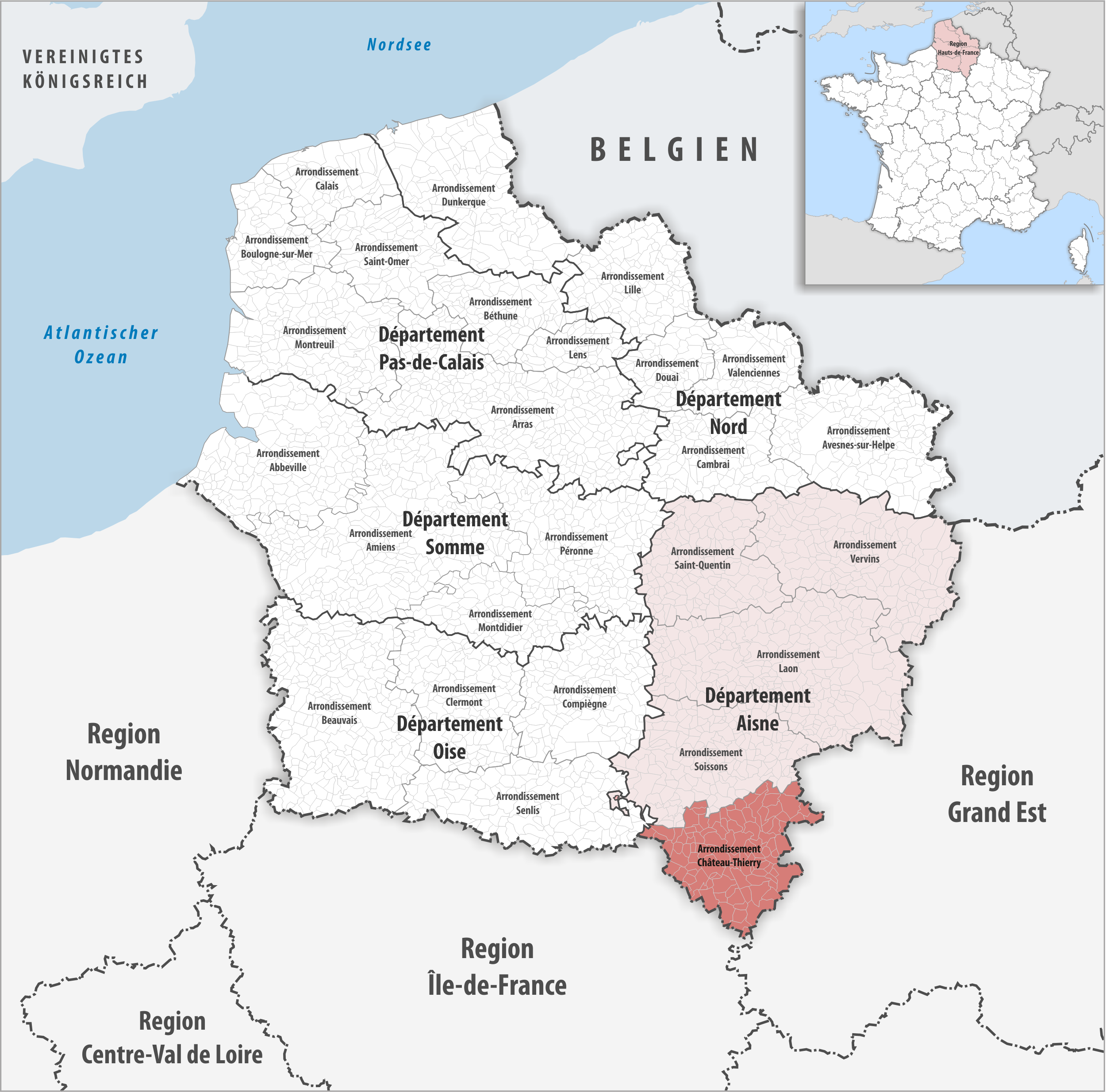 Lage des Arrondissements Château-Thierry